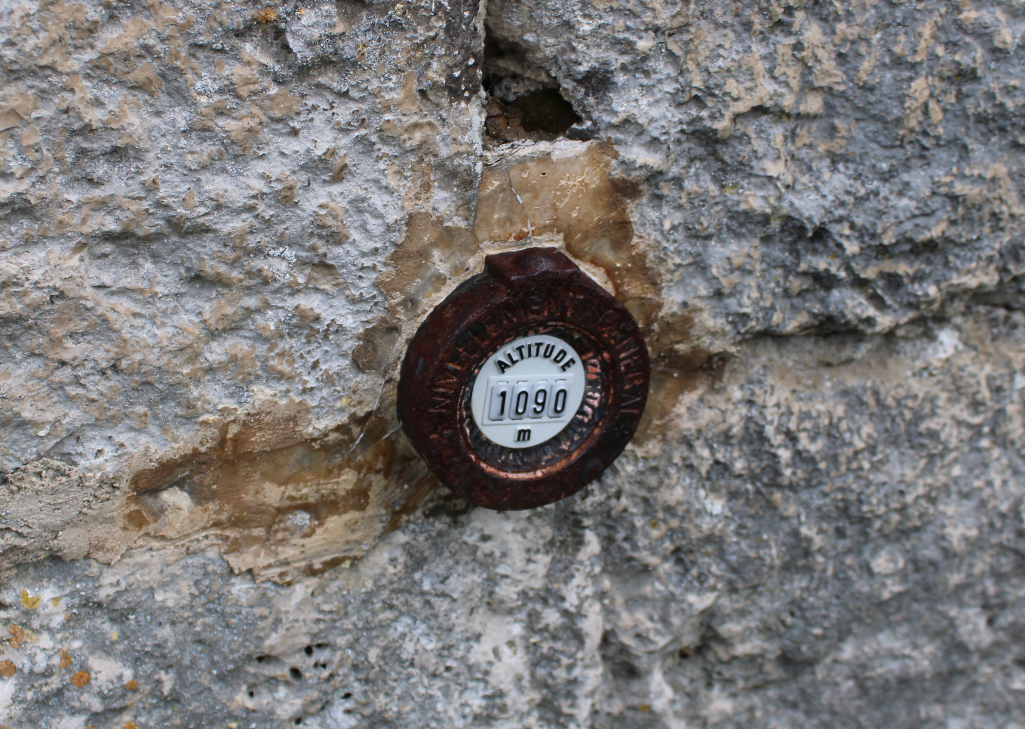 Borne d'altitude apposée sur la façade de l'église (1090 m)